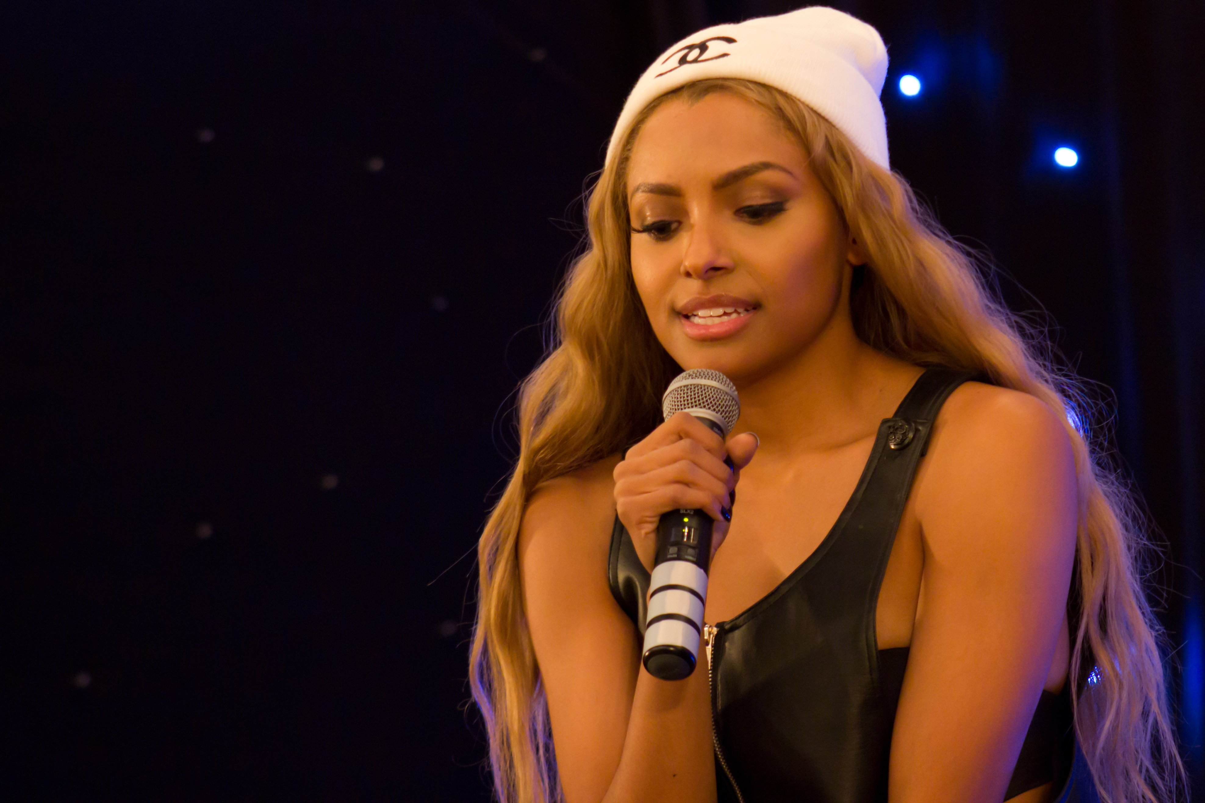 Kat Graham